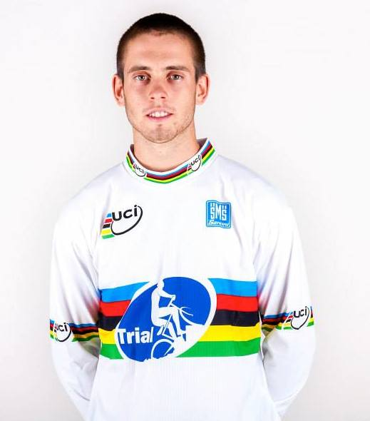 Abel Mustieles, con el maillot de campeón del mundo de Trial UCI logrado en la temporada 2013.